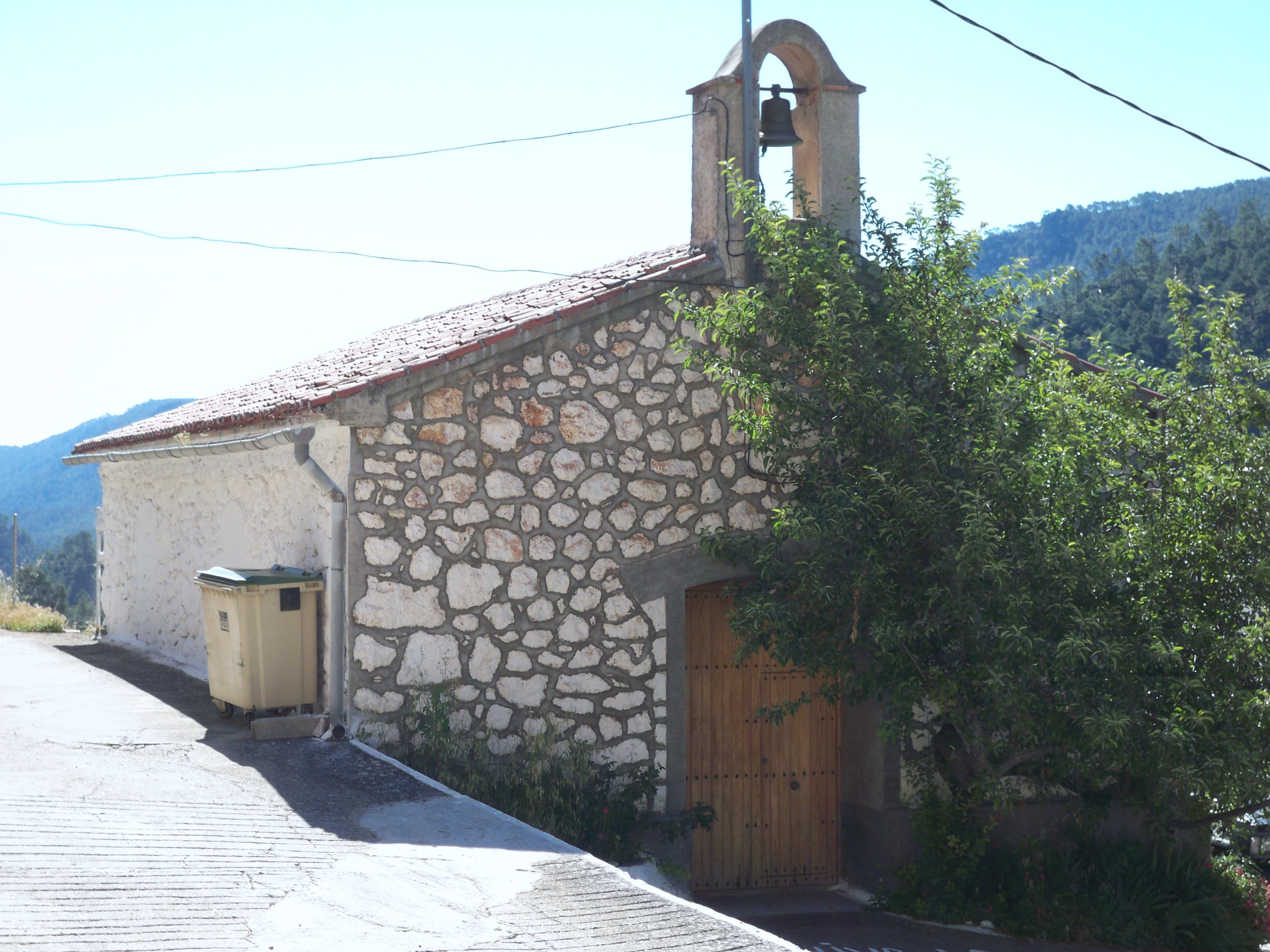 Vista de la iglesia de La Alfera (Molinicos - Albacete) dedicada a la Virgen de Fátima.